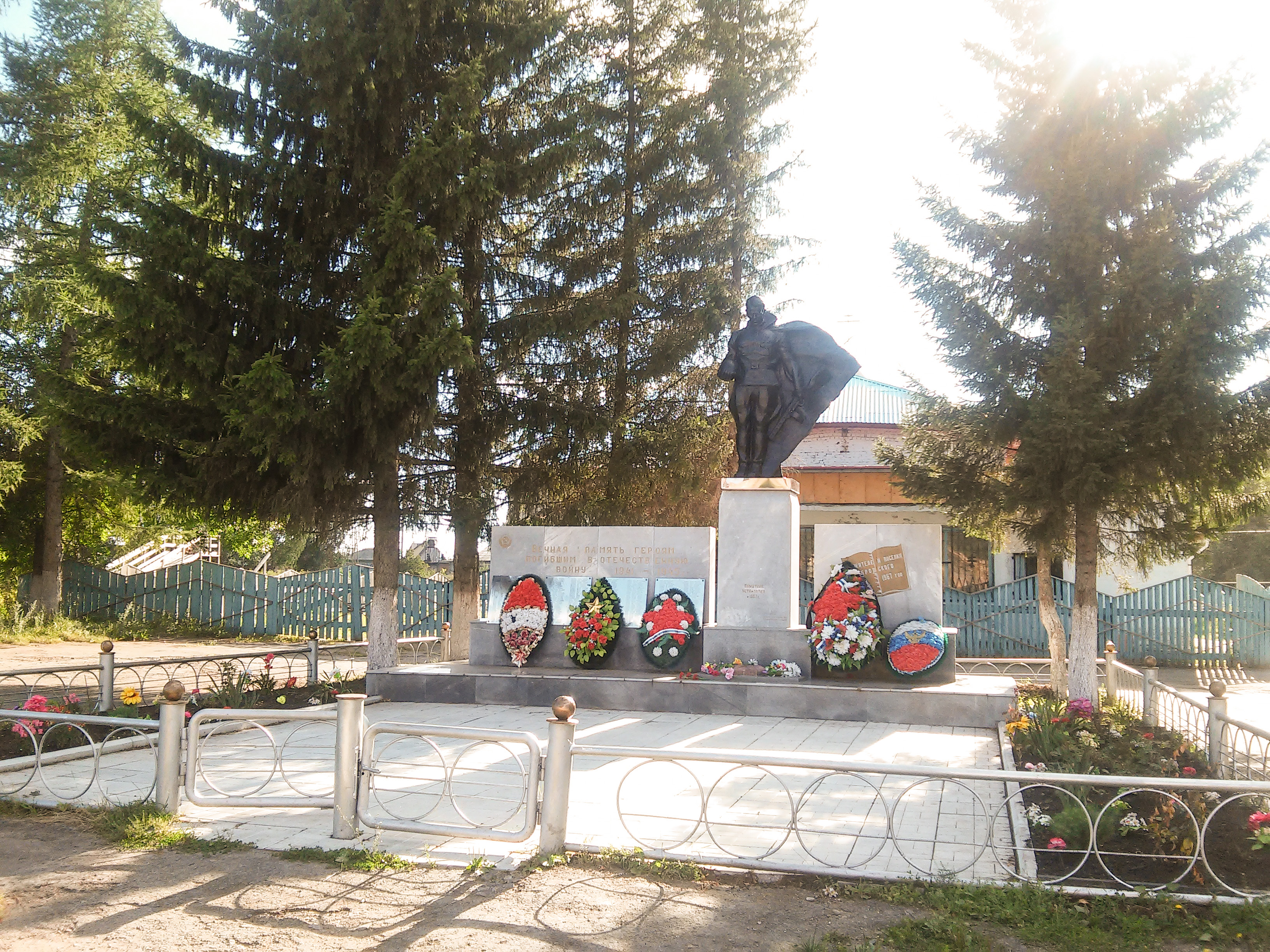 Памятник героям Великой Отечественной войны: Бобровский, Сысертский район, Свердловская область